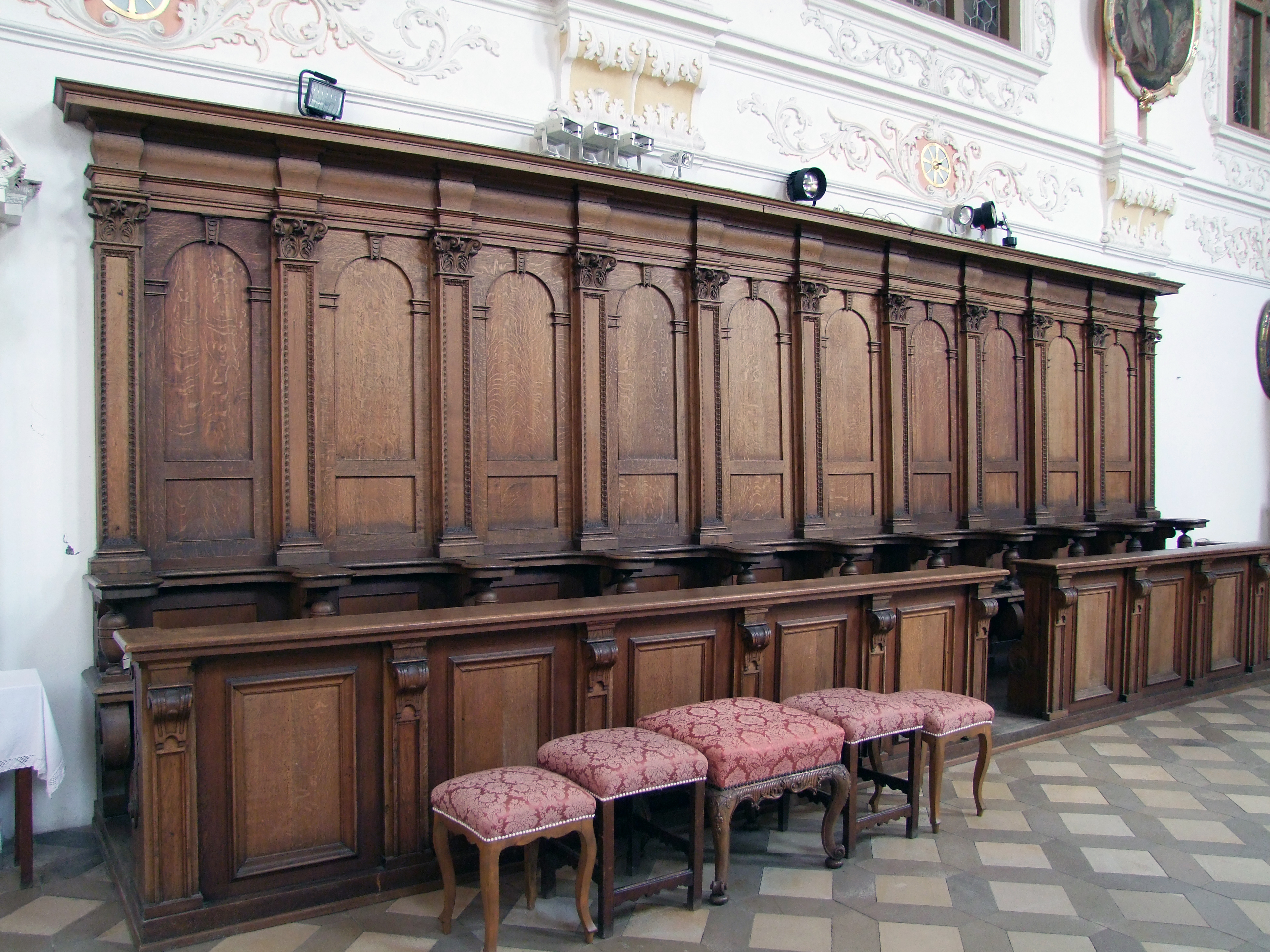 Mariä Verkündigung im oberschwäbischen Mindelheim. Ehemalige Augustiner, dann Jesuitenklosterkirche.